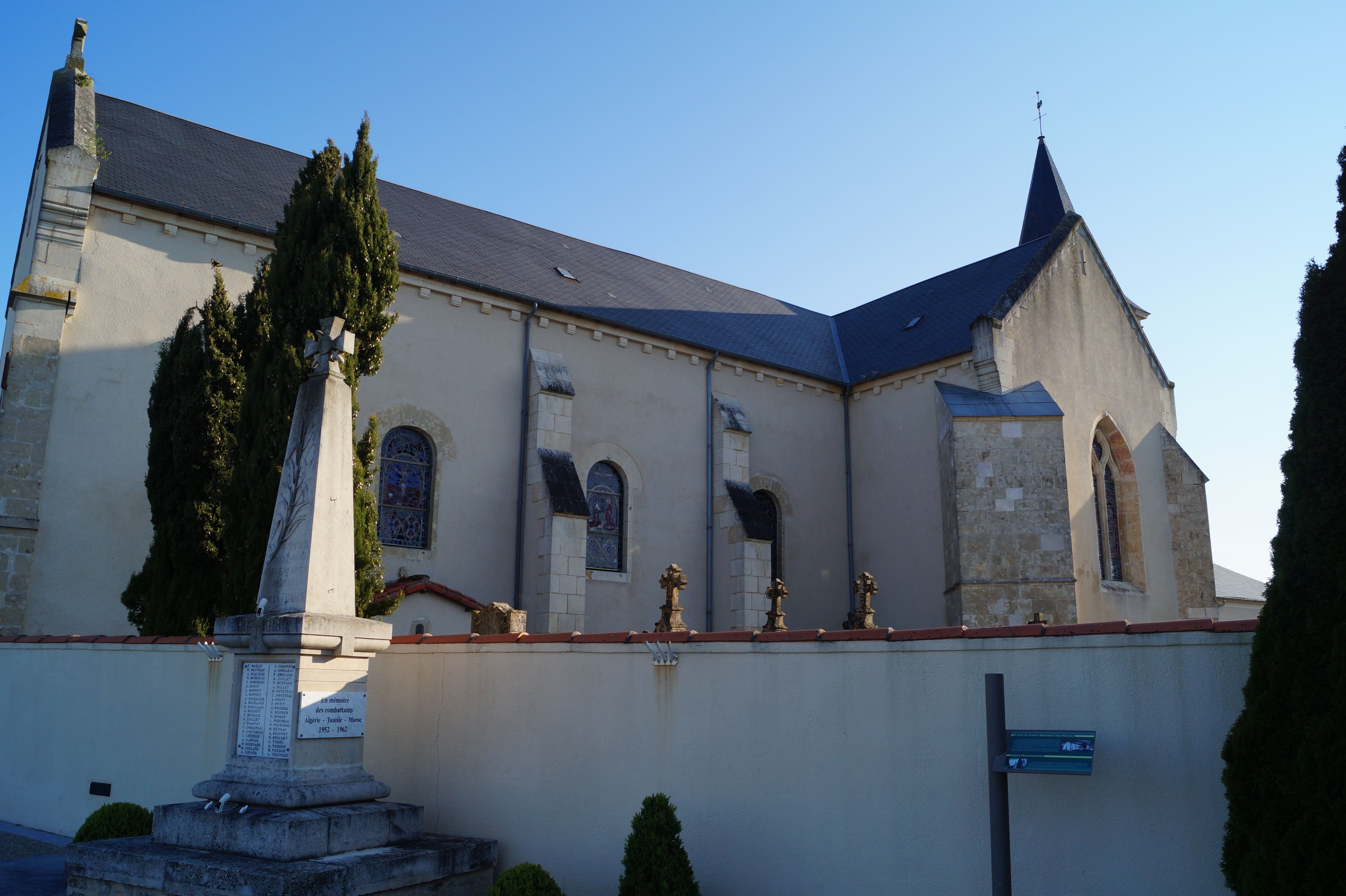 Le monument aux morts et l’église Saint-Maurice de Saint-Maurice-des-Noues depuis la rue de l’Église.